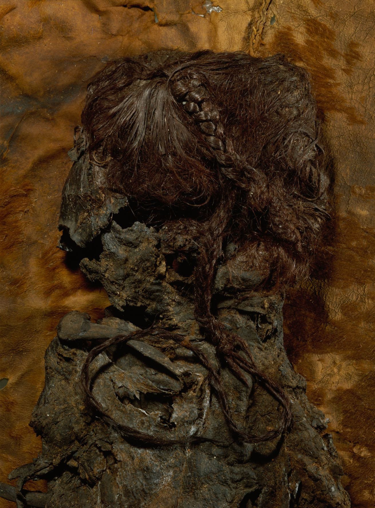 Moselig Ellingpigen